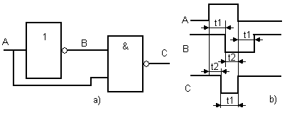 Edge detector for falling signals / Detector de flanco (Detector flank) / Flankendetektor für fallende Flanken